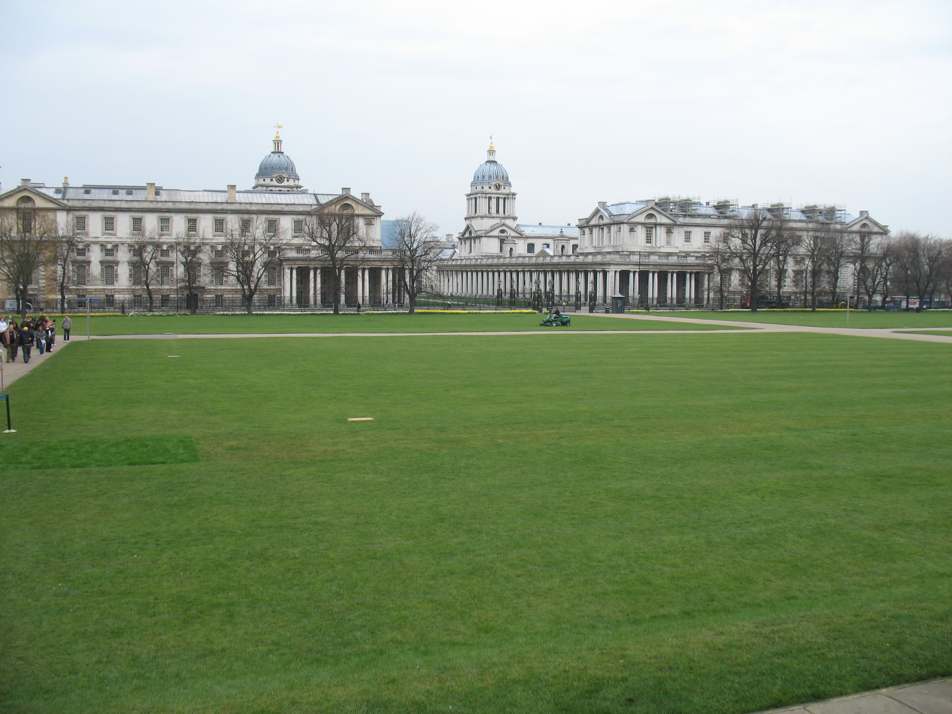 Queen's House in Greenwich